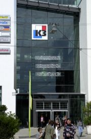 Eingang zum Theaterforum K3 in Heilbronn